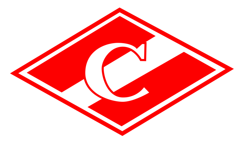 Altes Vereinswappen von Spartak Moskau